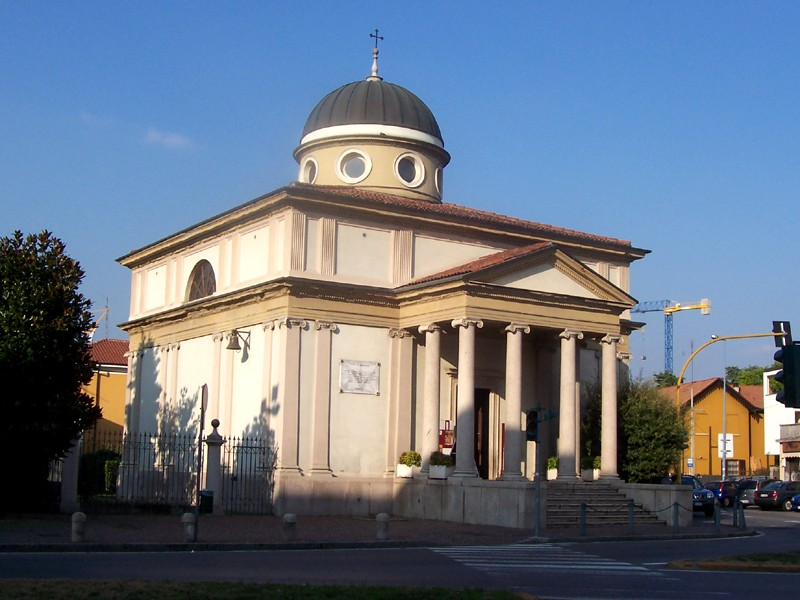 Brugherio - Tempietto di S. Lucio